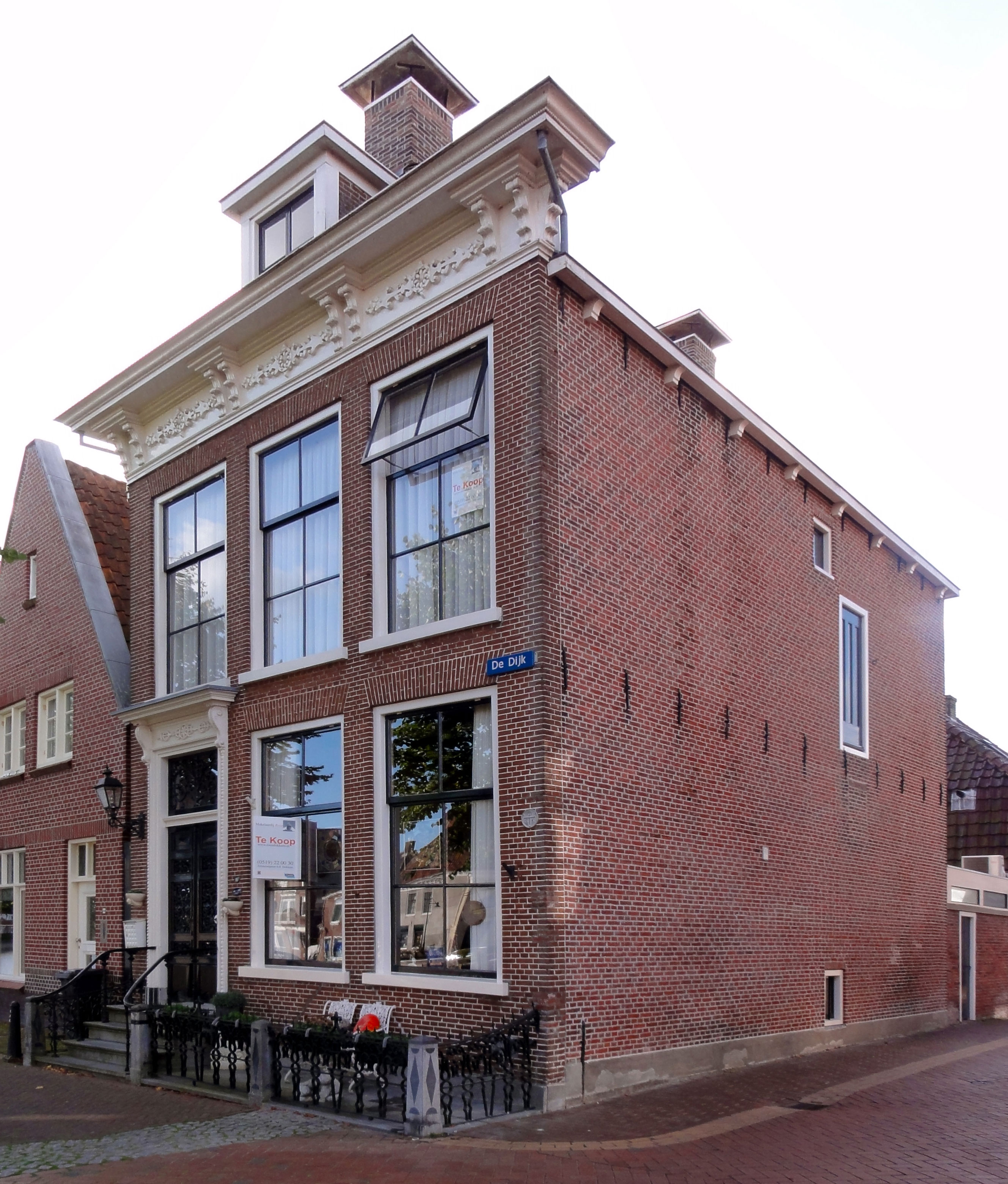 De Dijk 16 Dokkum. rijksmonument